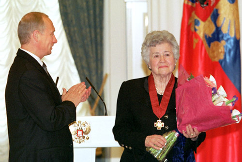 МОСКВА, КРЕМЛЬ. Церемония вручения государственных наград. Орден «За заслуги перед Отечеством» II степени вручен директору Государственного музея изобразительных искусств имени А.С.Пушкина Ирине Антоновой.